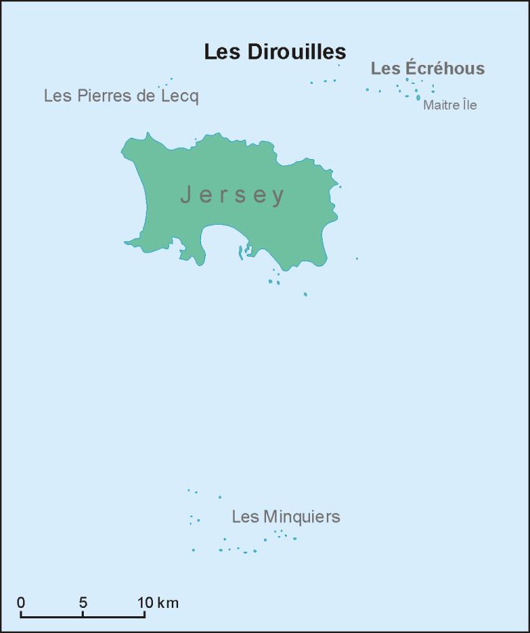 Location map of Les Dirouilles